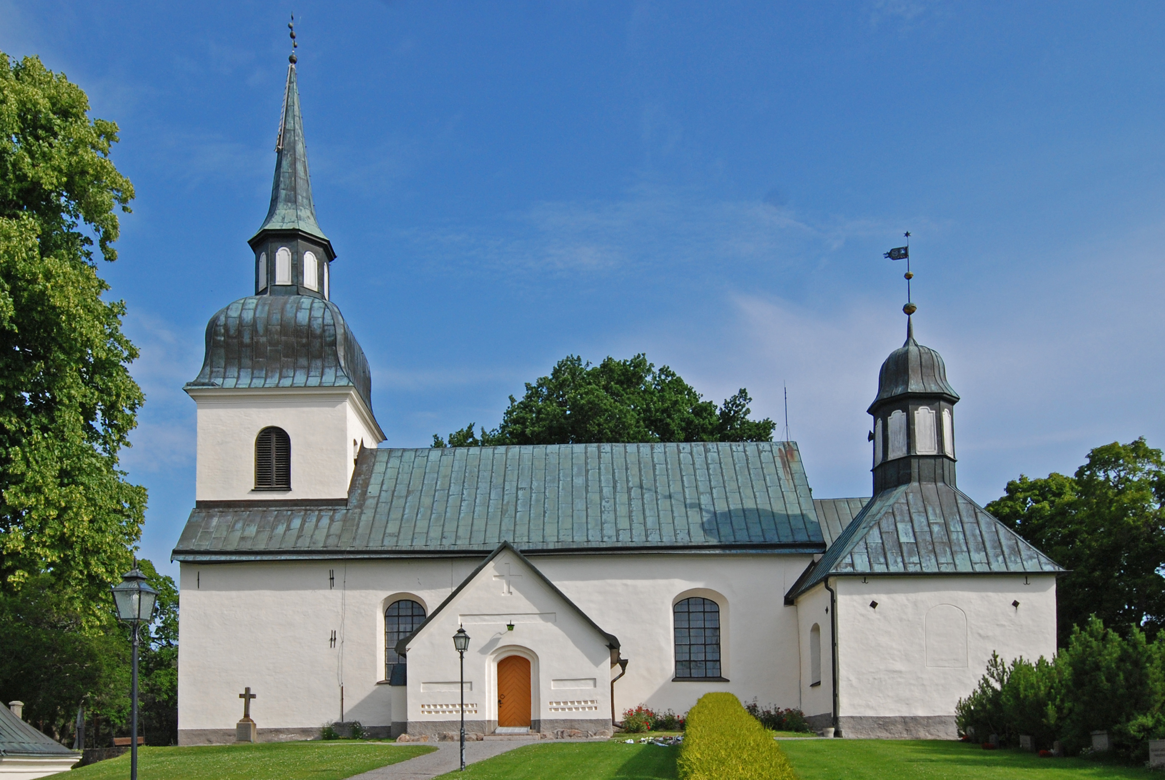 Husby-Rekarne kyrka